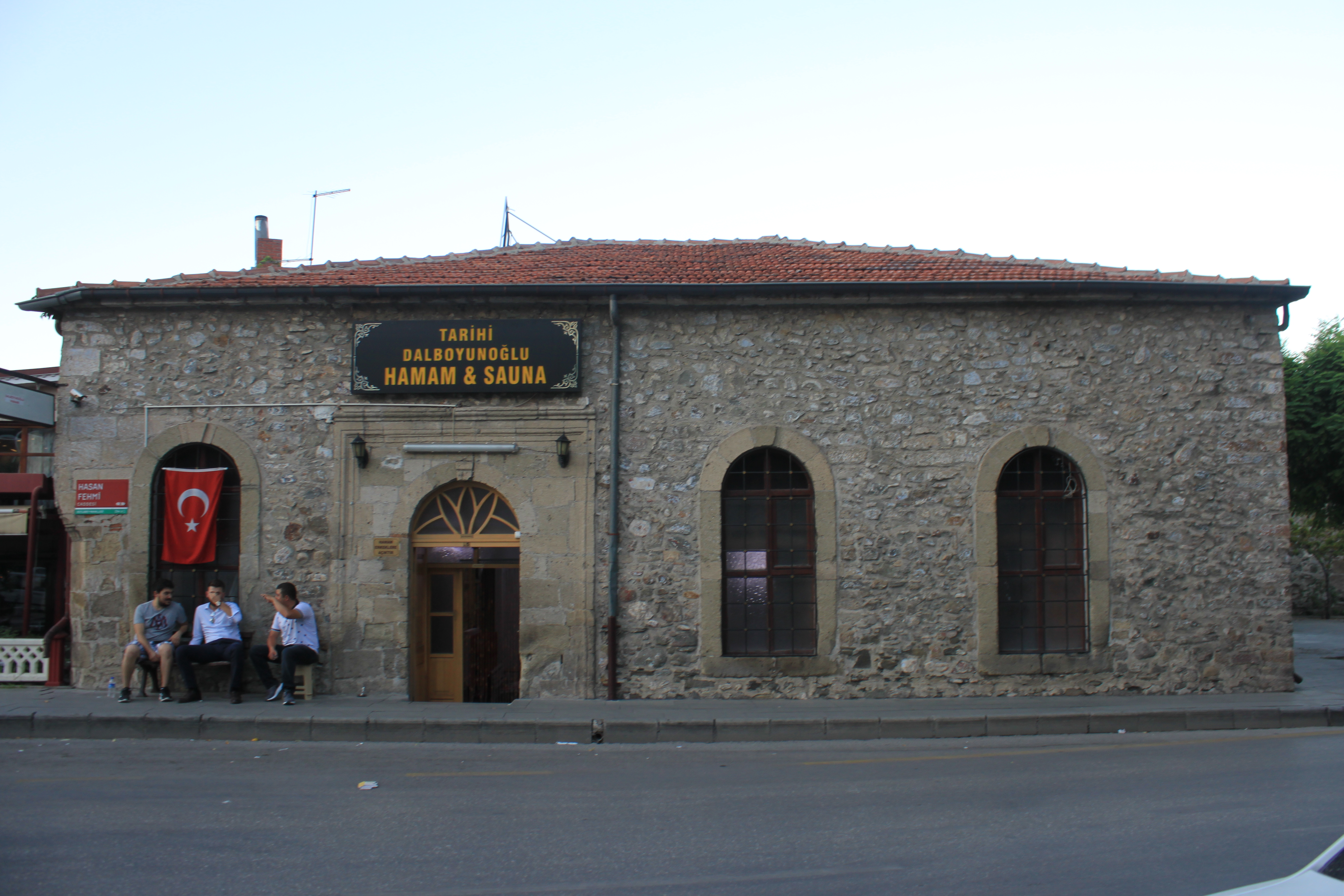 Osmanischer Hamam im Zentrum von Isparta